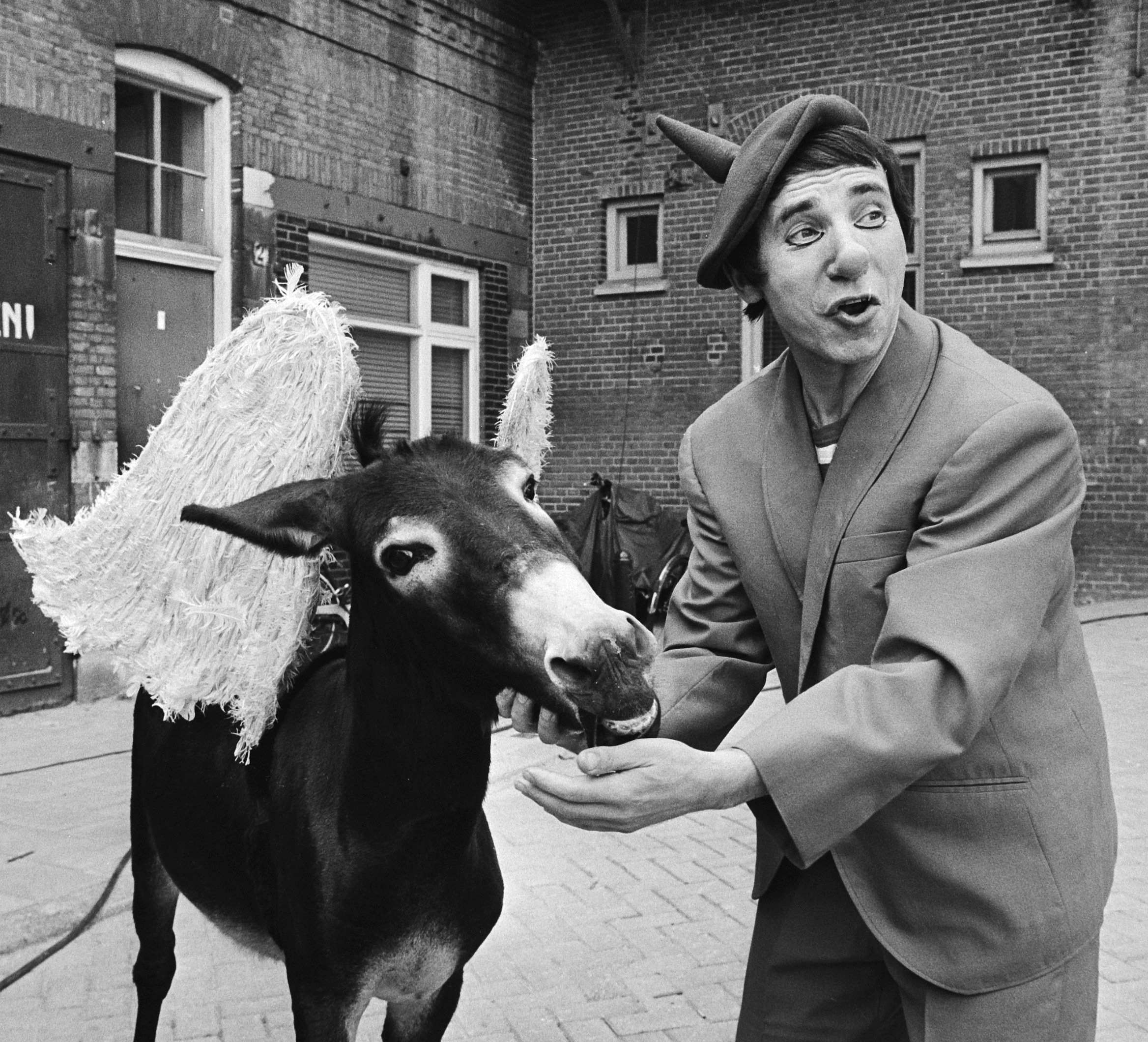 Optreden van clown André Nikolajev met ezeltje voor de pers